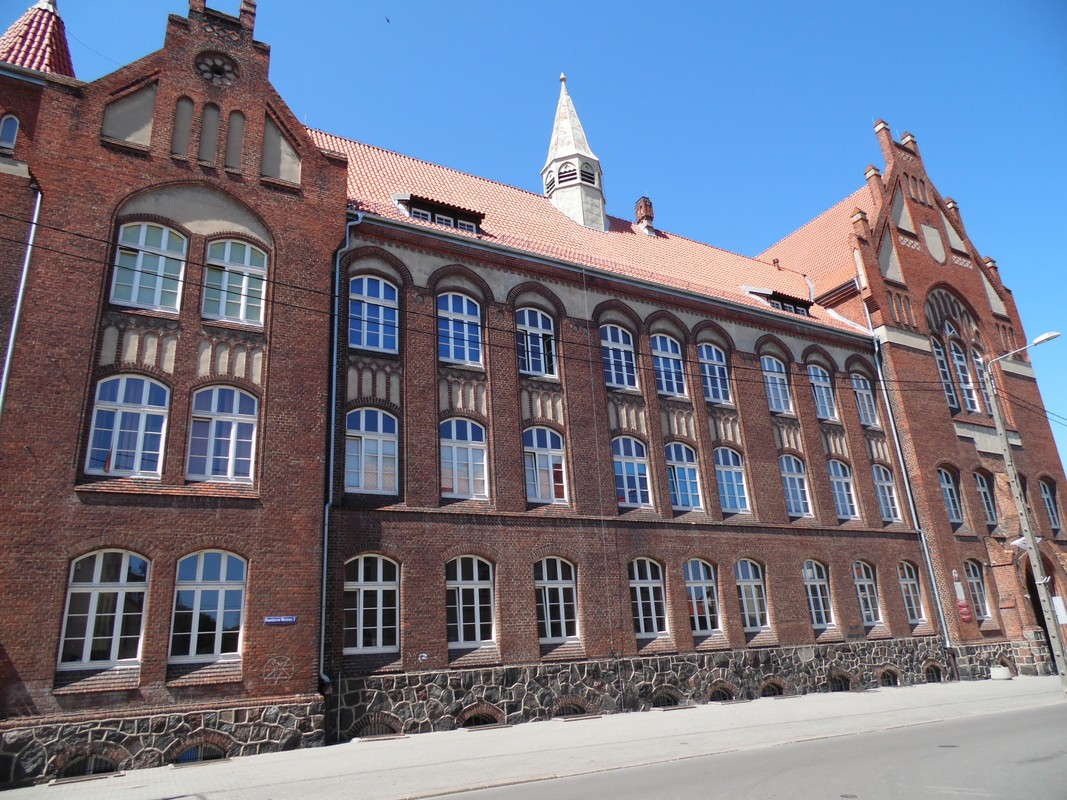 SZKOŁA W ZABYTKOWEJ KAMIENICY.